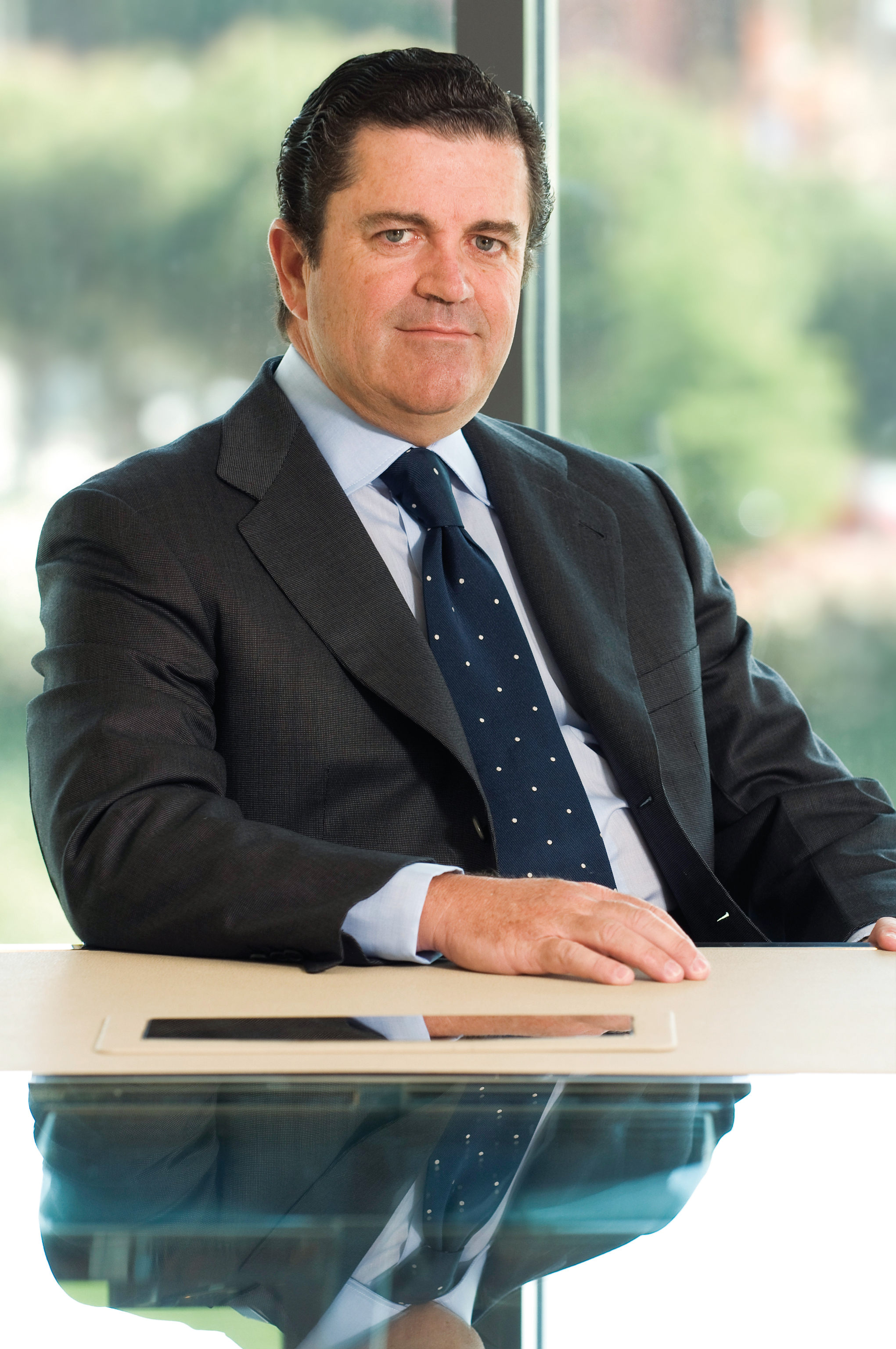 Borja Prado, presidente de Endesa